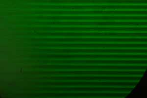 Optisches Wellengitterbild, entstanden durch Debye-Sears-Effekt